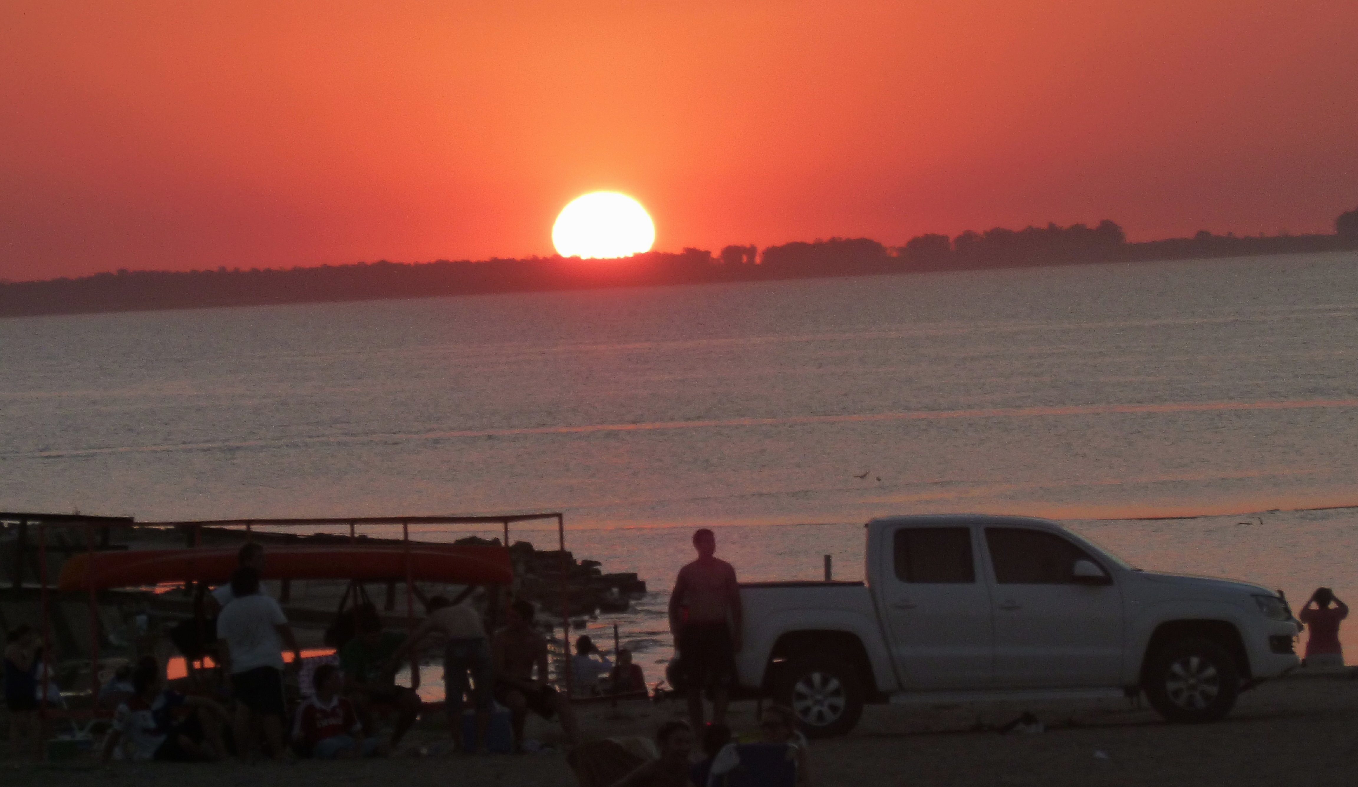 Atardecer en los Bañados del Rio Dulce y Laguna Mar Chiquita(Reserva Provincial de Cordoba-Argentina_Declarada sitio Ramsar